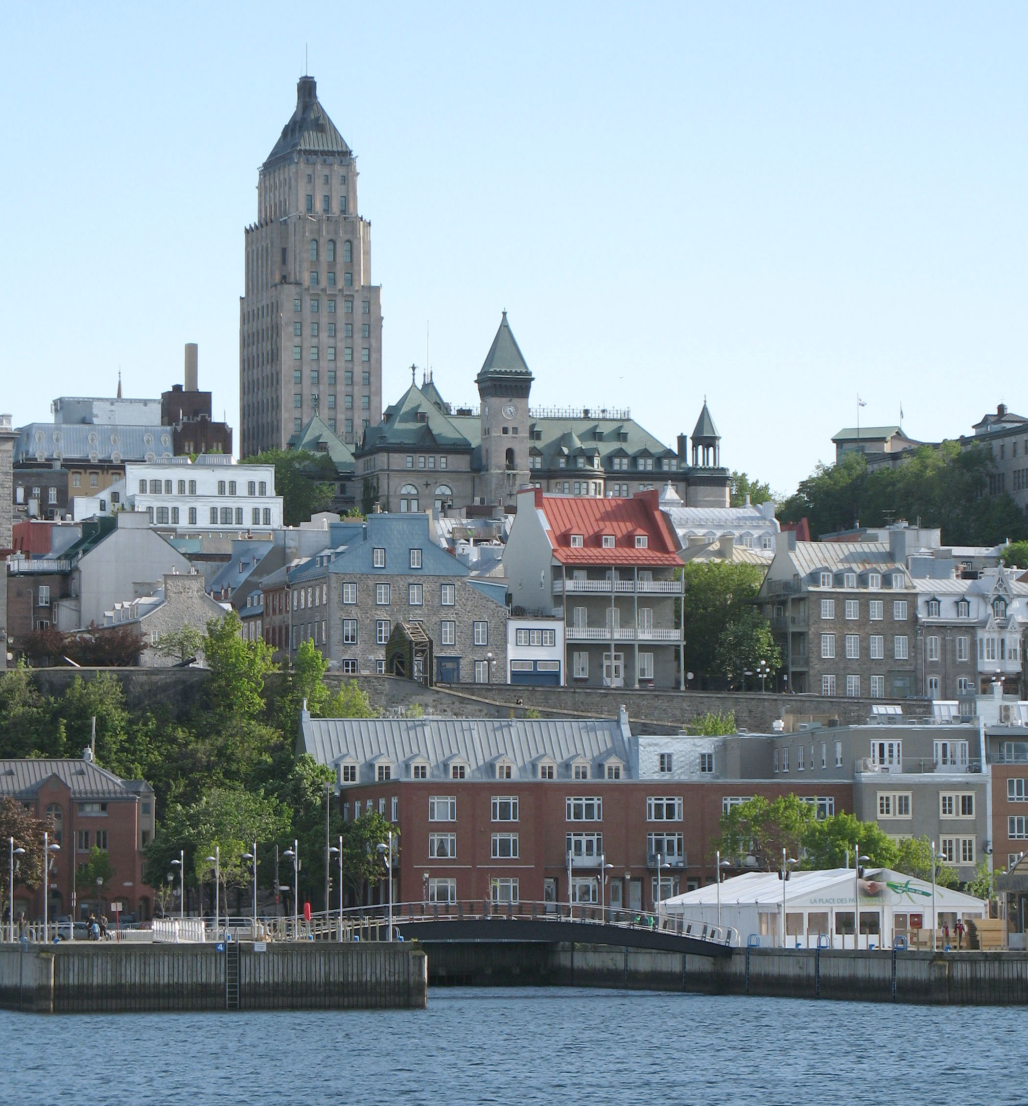 Édifice Price vu du Vieux-Port de Québec. Québec. Canada